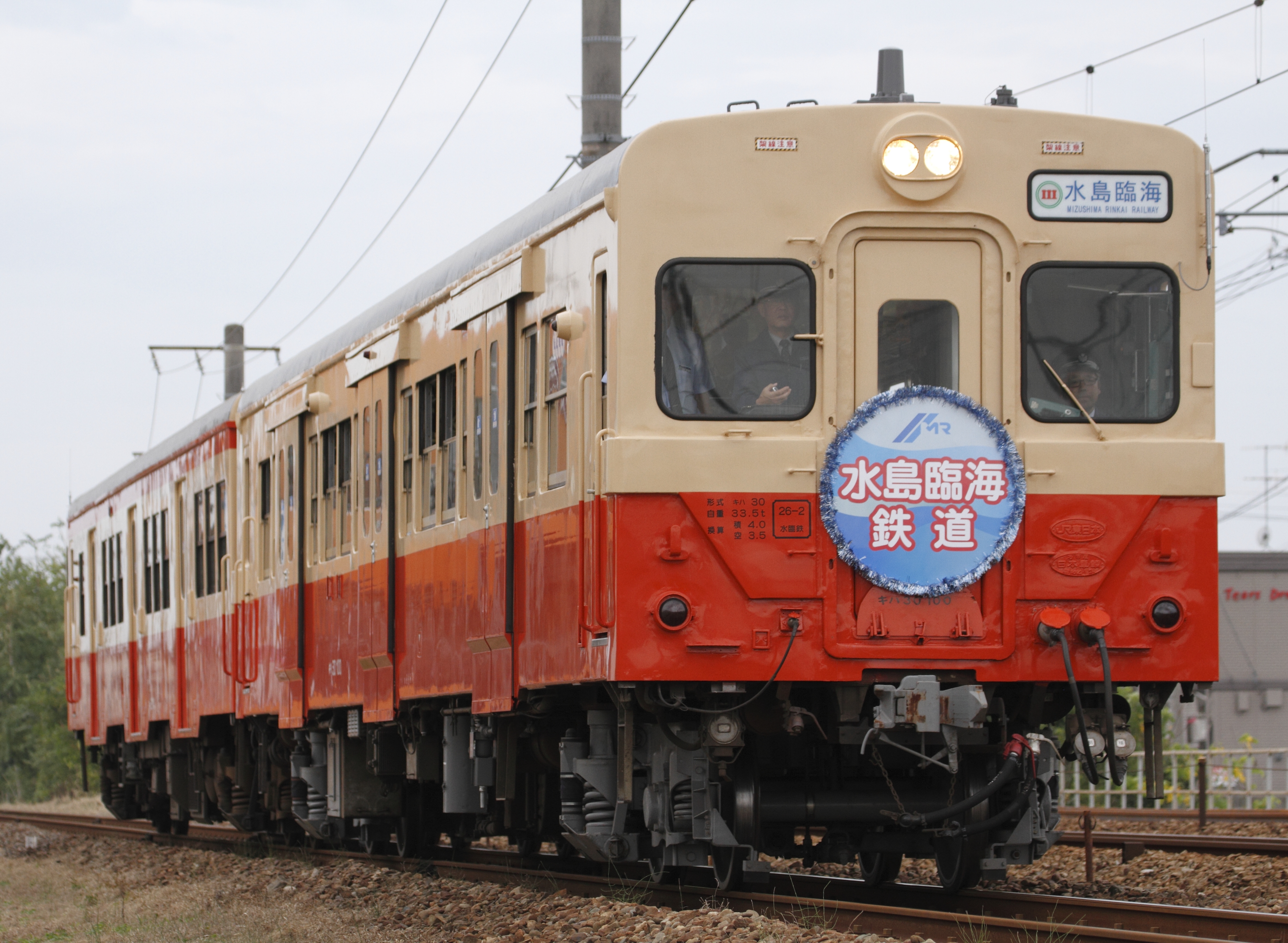 水島臨海鉄道キハ30形気動車 100 球場前-倉敷市